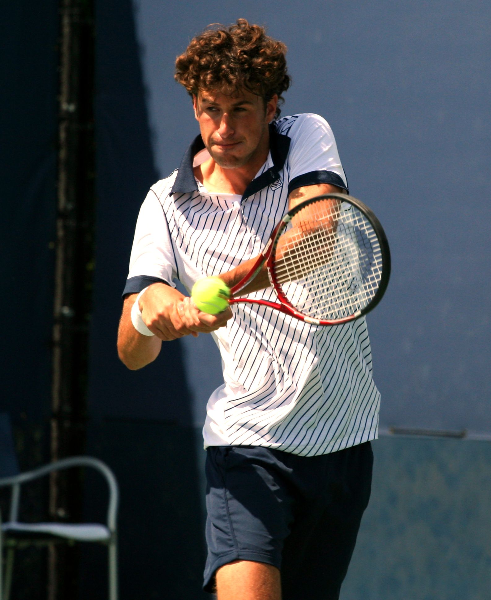 U.S. Open Wednesday, Aug. 31, 2011